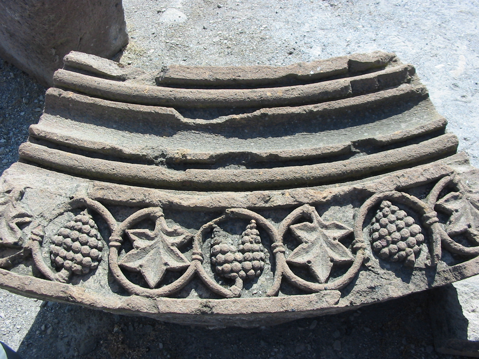 Photo